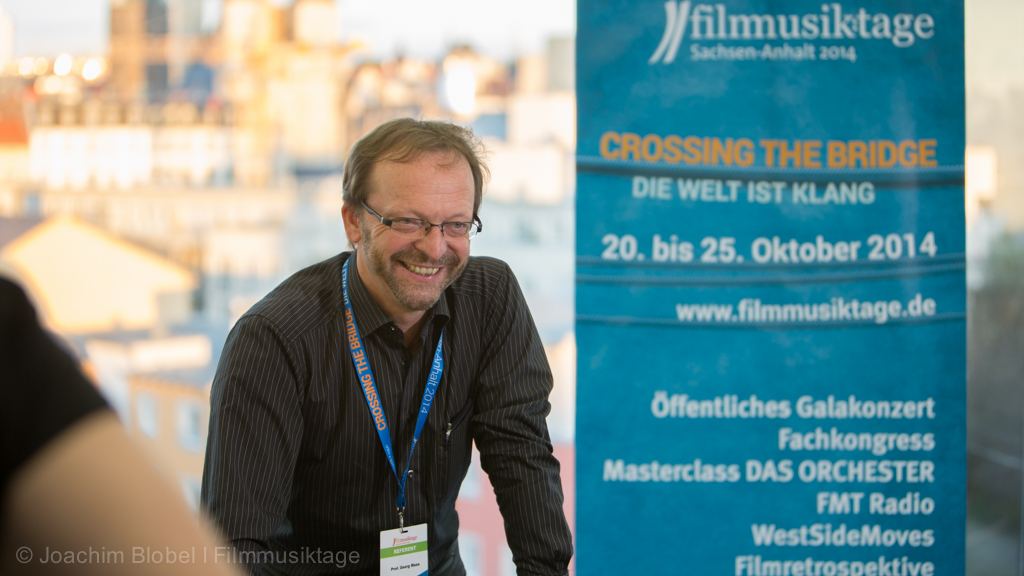 Georg Maas bei der Masterclass der Filmmusiktage Sachsen-Anhalt 2014 (c) Joachim Blobel